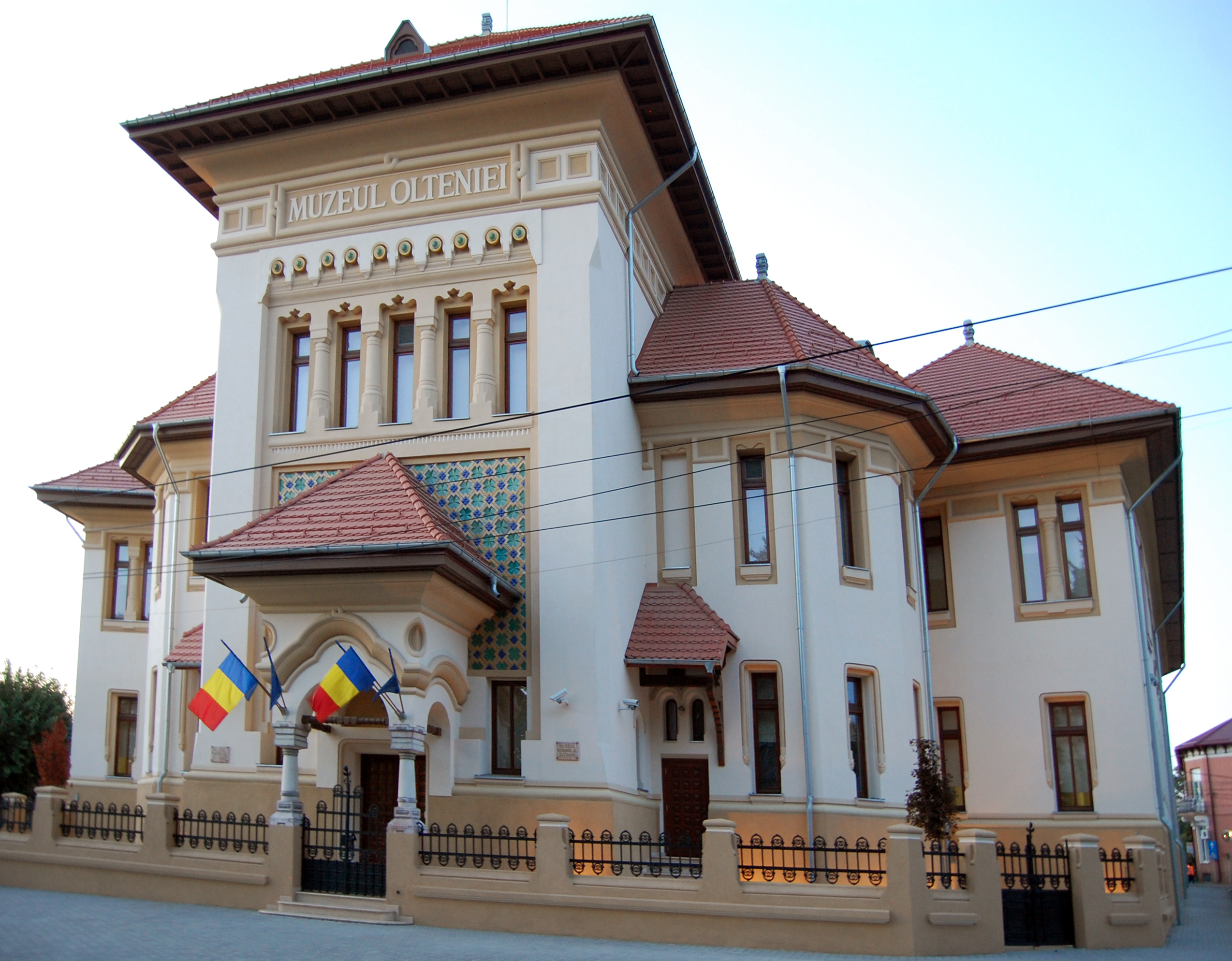 Școala Centrală de fete, azi Muzeul Olteniei